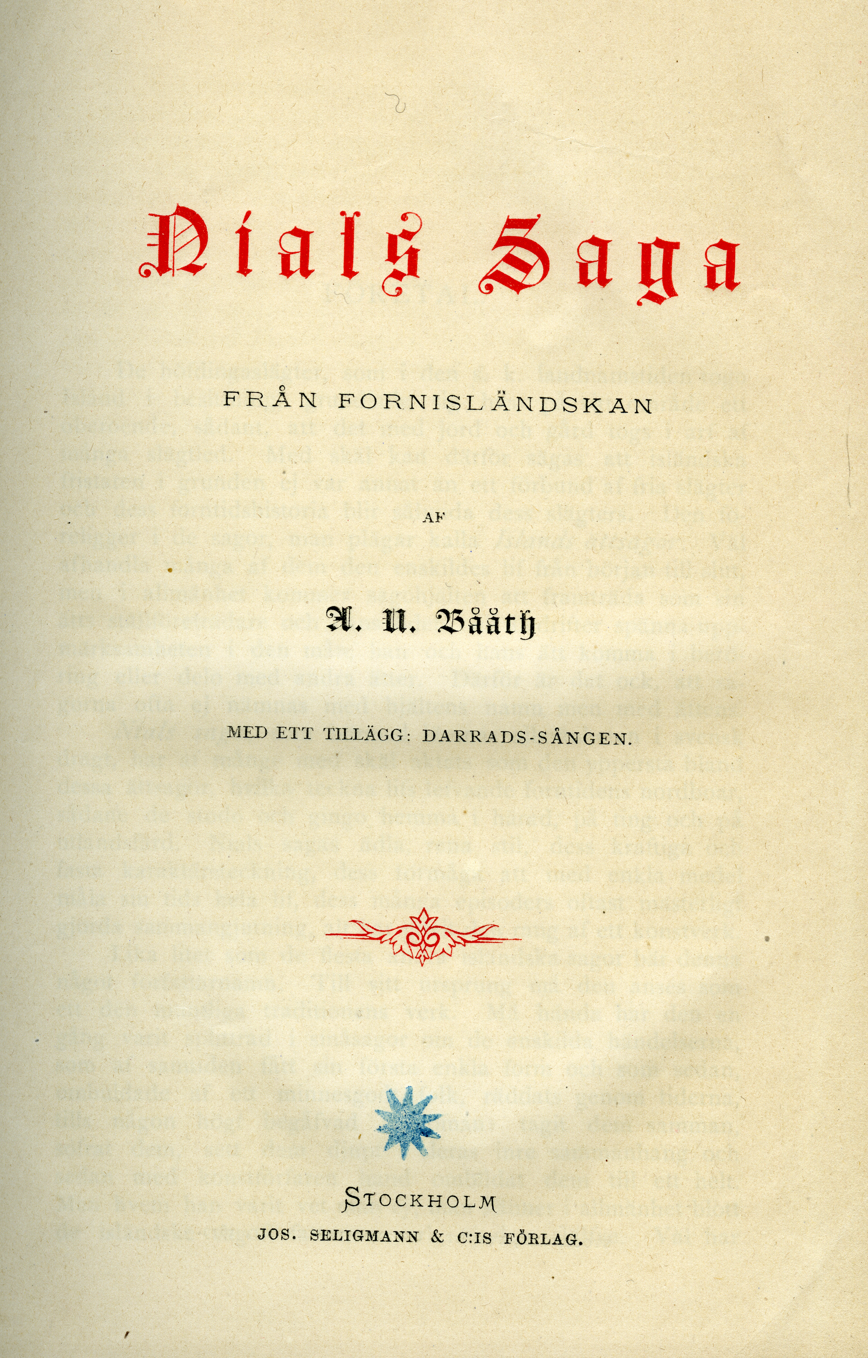 Titelbladet till Nials Saga (1879) i svensk översättning från fornisländskan av A. U. Bååth.